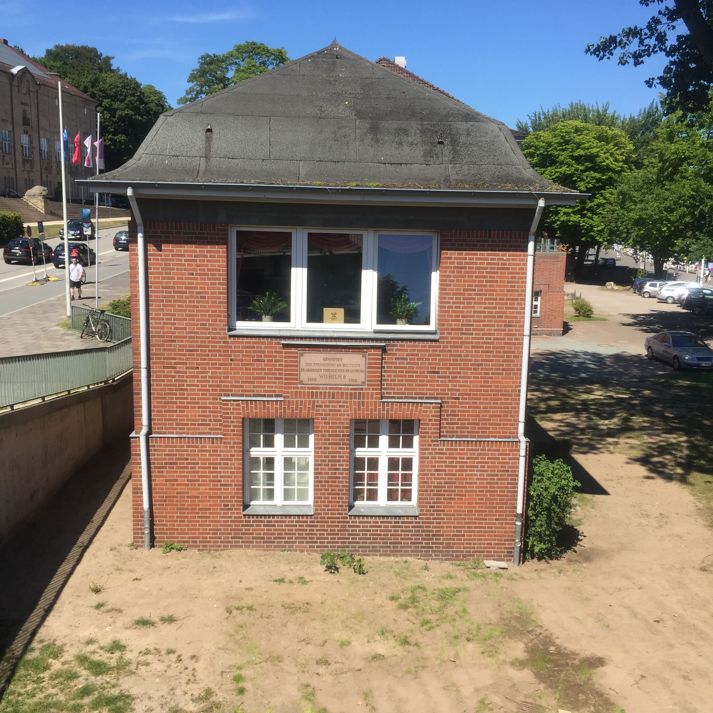 Seeburg (Kiel) Stirnansicht mit Gedenktafel